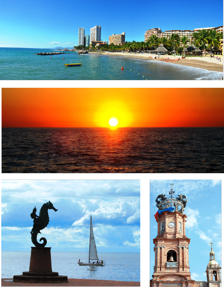 Imagen realizada con cuatro archivos de Commons: by Tiffa Day by Elias Garcia-Ortiz by Harvey Barrison by James Hawley